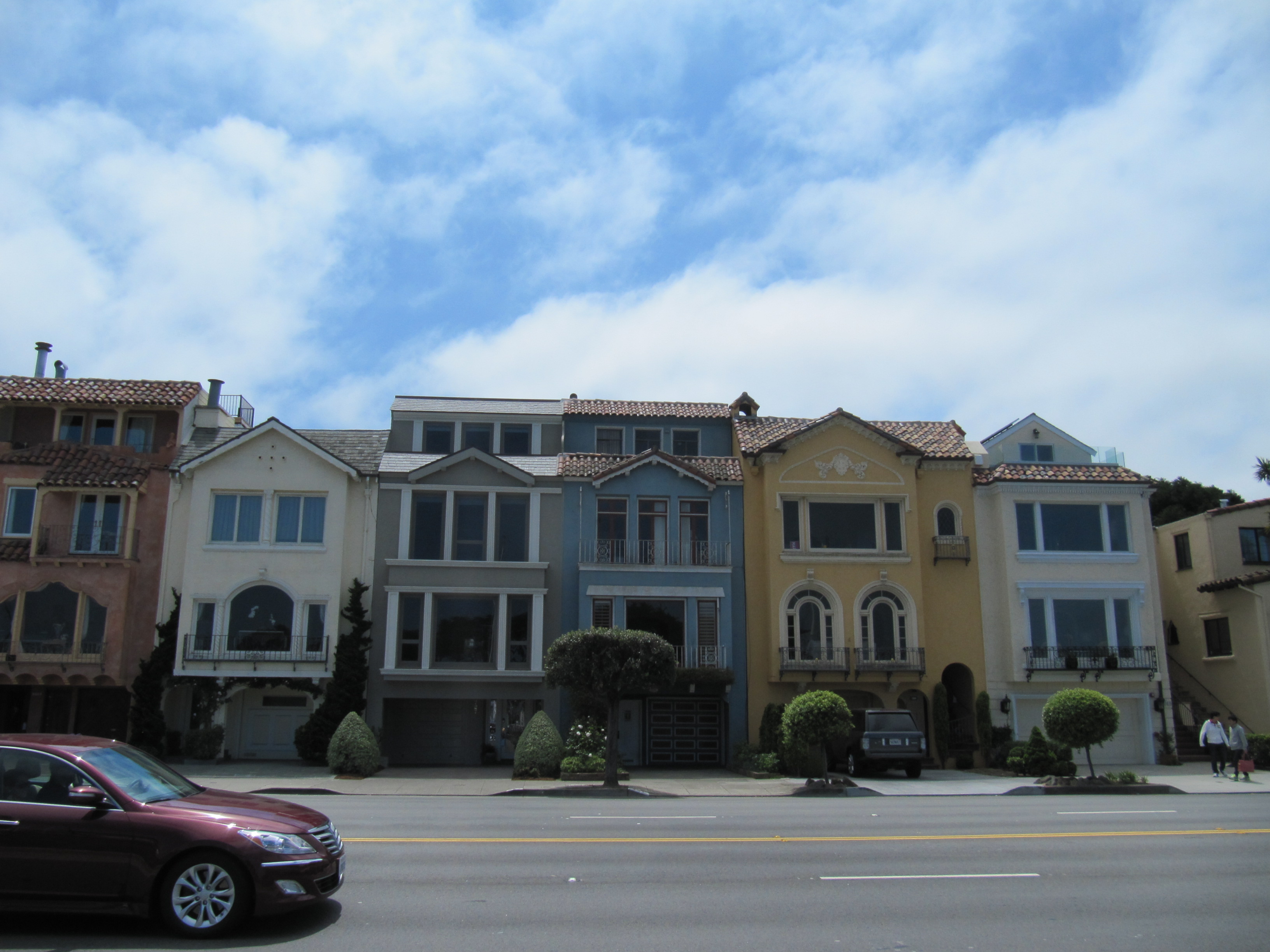 Fenêtres en baie a San Francisco en 2013